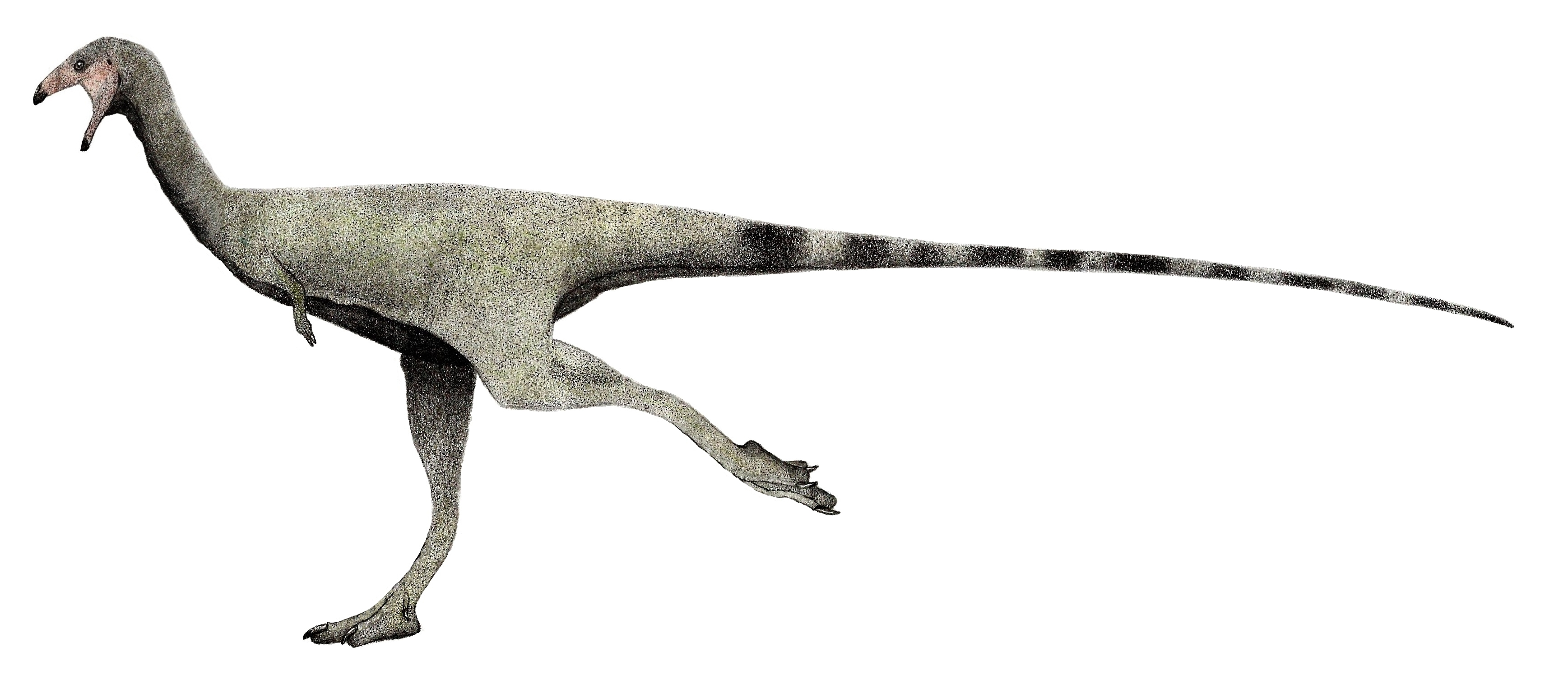 Recreación en vida de Limusaurus inextricabilis basado en el diagrama del holotipo por Jaime A. Headden User:Qilong [1]. Also matches published reconstruction by Gregory S. Paul in the 2016 book The Princeton Field Guide to Dinosaurs.